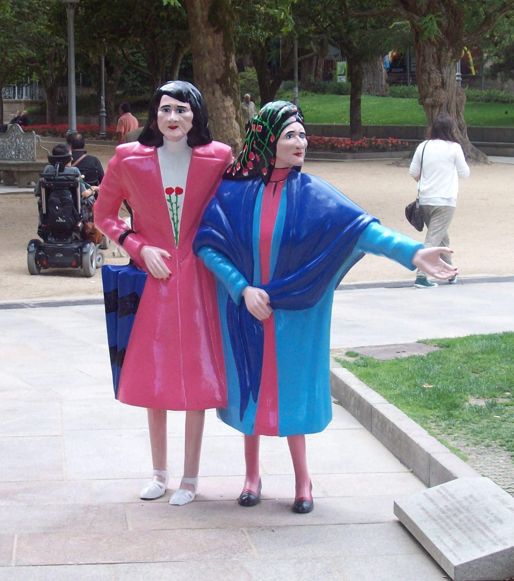 Coralia e Maruxa Fandiño, foron dúas irmáns cheas de vida que se lles vía pasear polas rúas de Santiago nos anos 50, 60 engalanadas con traxes de coores de súa propia fabricación.